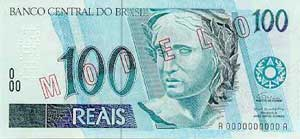 100 бразильских реалов